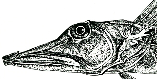 Head of Red icefish Channichthys rugosus Regan, 1914, adult male, 283 mm TL, 255 mm SL, Kerguelen Is, Antarctica